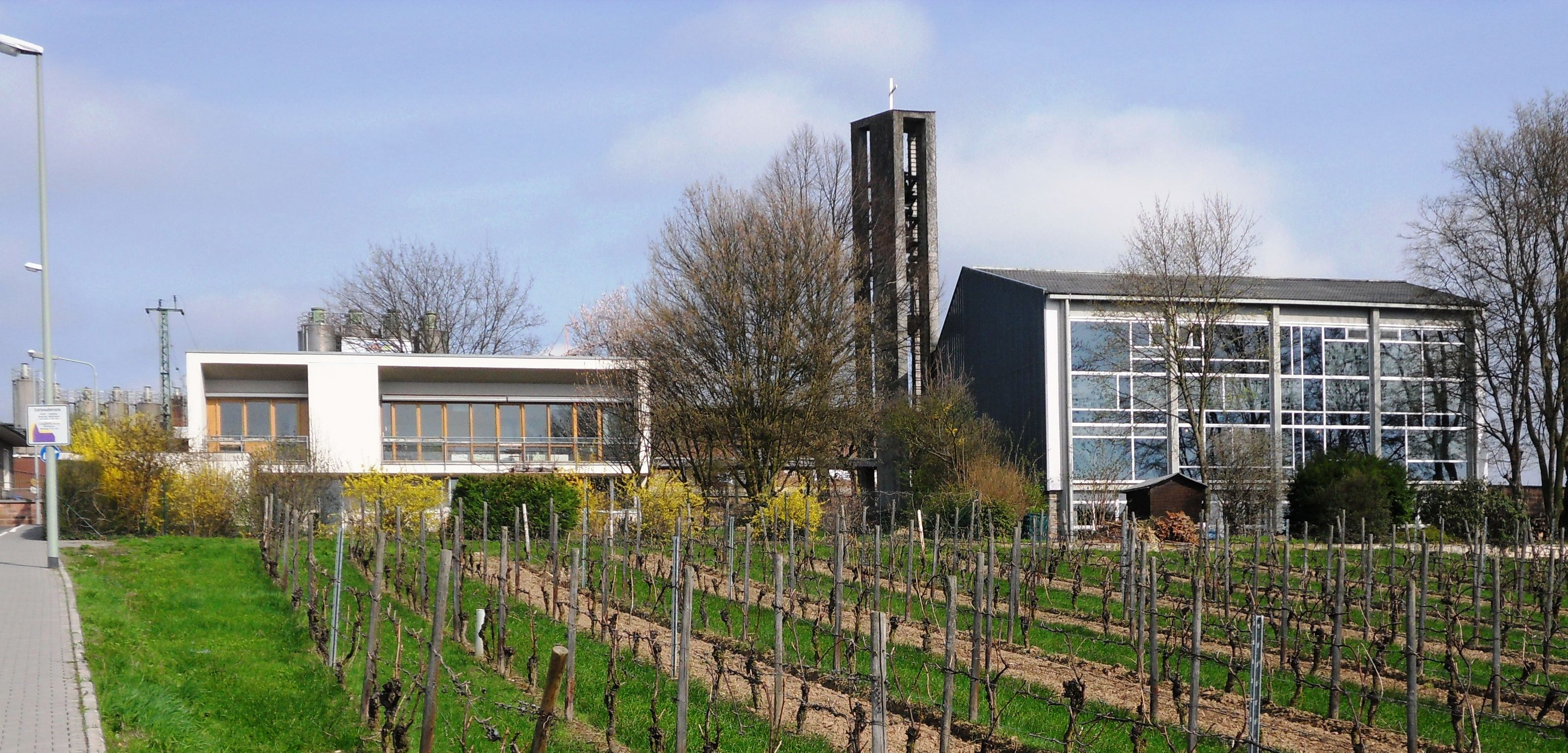 Evangelische Kirche Oestrich-Winkel in Mittelheim mit Pfarrhaus, Blick von Süden